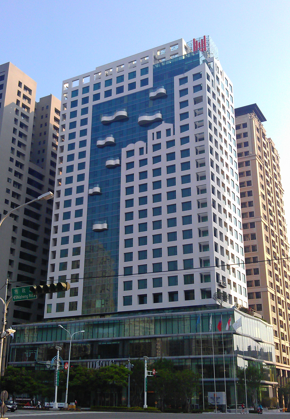 台中日月千禧酒店。